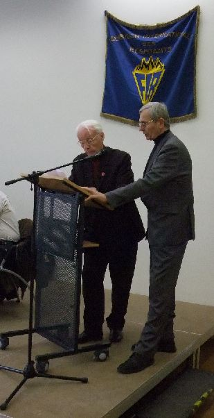 Adnan Qatipi beim 15. Kongress der FIR, rechts der russische Dolmetscher